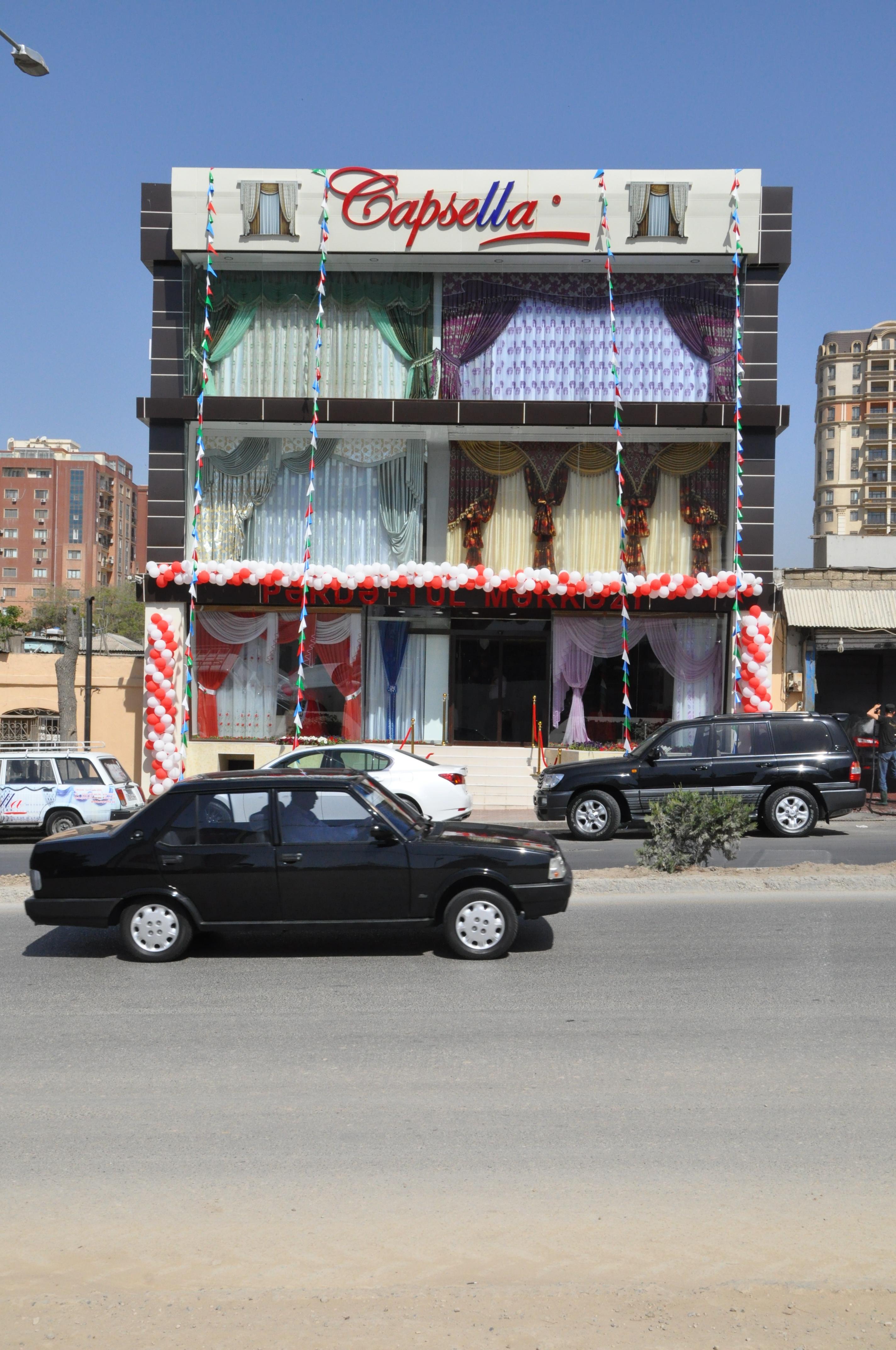 Bakıda Təbriz küçəsi 71. Capsella pərdə-tül mərkəzi